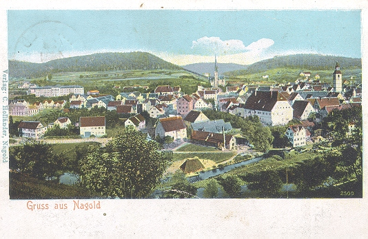 Nagold im Schwarzwald - alte Postkarte